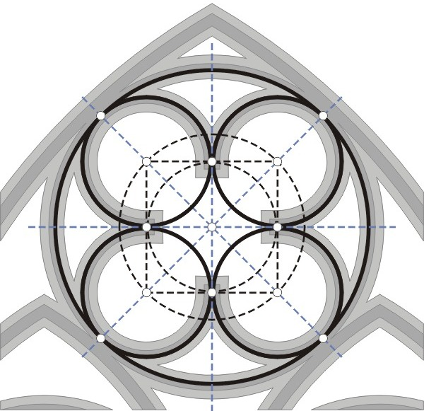 Darstellung zeigt einen Vierpass, ein gotisches Bauelement, mit Konstruktionslinien. Graphik erstellt 08/2005 von Benutzer:Sansculotte. Bild ist unter der CCBYSA zur weiteren Verwendung freigegeben. Quellenangabe und Beleg an [1] erbeten.